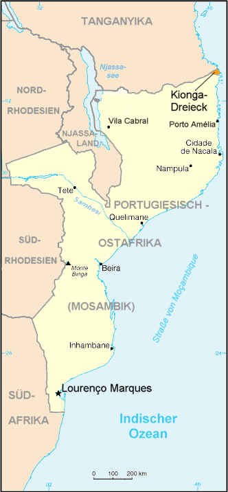 Kionga-Dreieck 1919 von Deutsch-Ostafrika an Port.-Ostafrika, portugiesische Ortsnamen und Namen der Nachbarländer zur Zeit der brit. Kolonialzeit